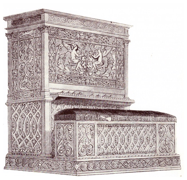 Organo costruito da Ducci e premiato all'Esposizione di Londra nel 1851